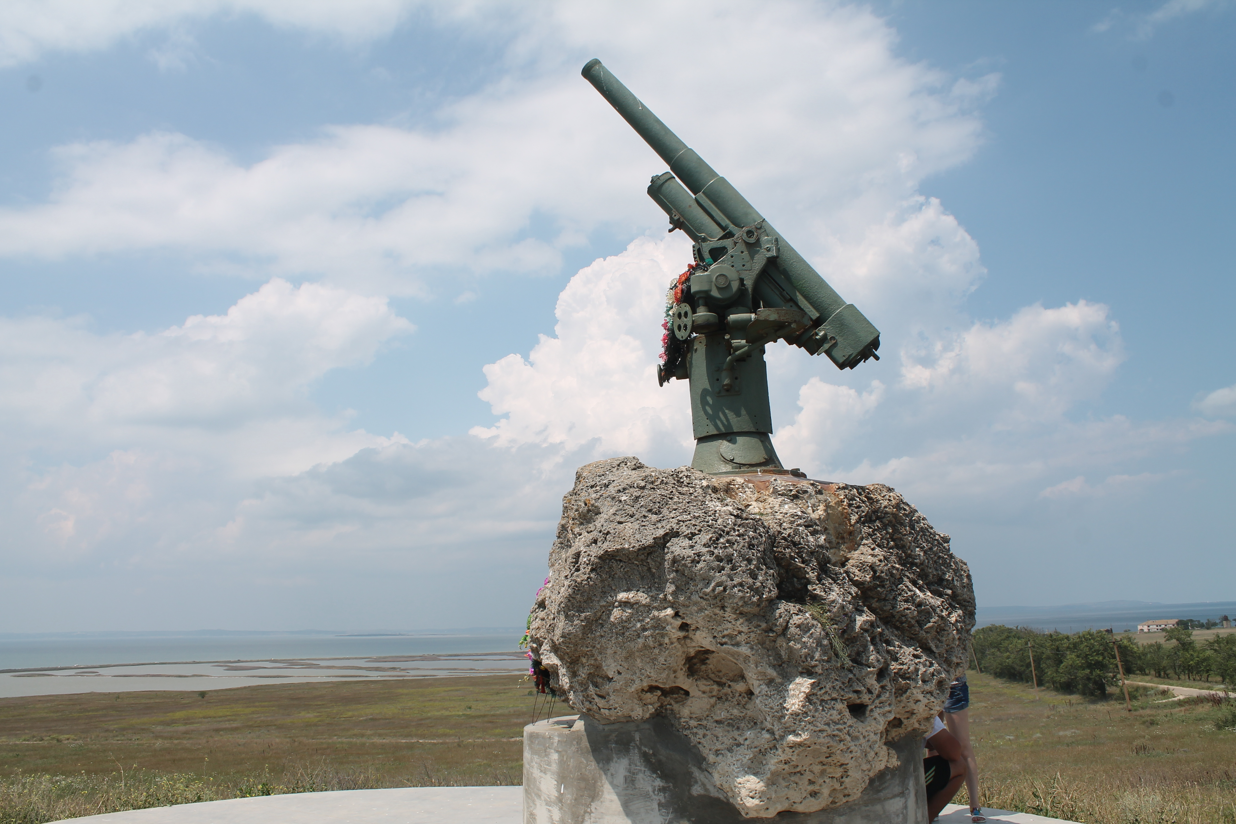 Памятник советским десантникам погибшим в 1943-1944 годах на водах Керченского пролива и Таманского залива в битве за Крым